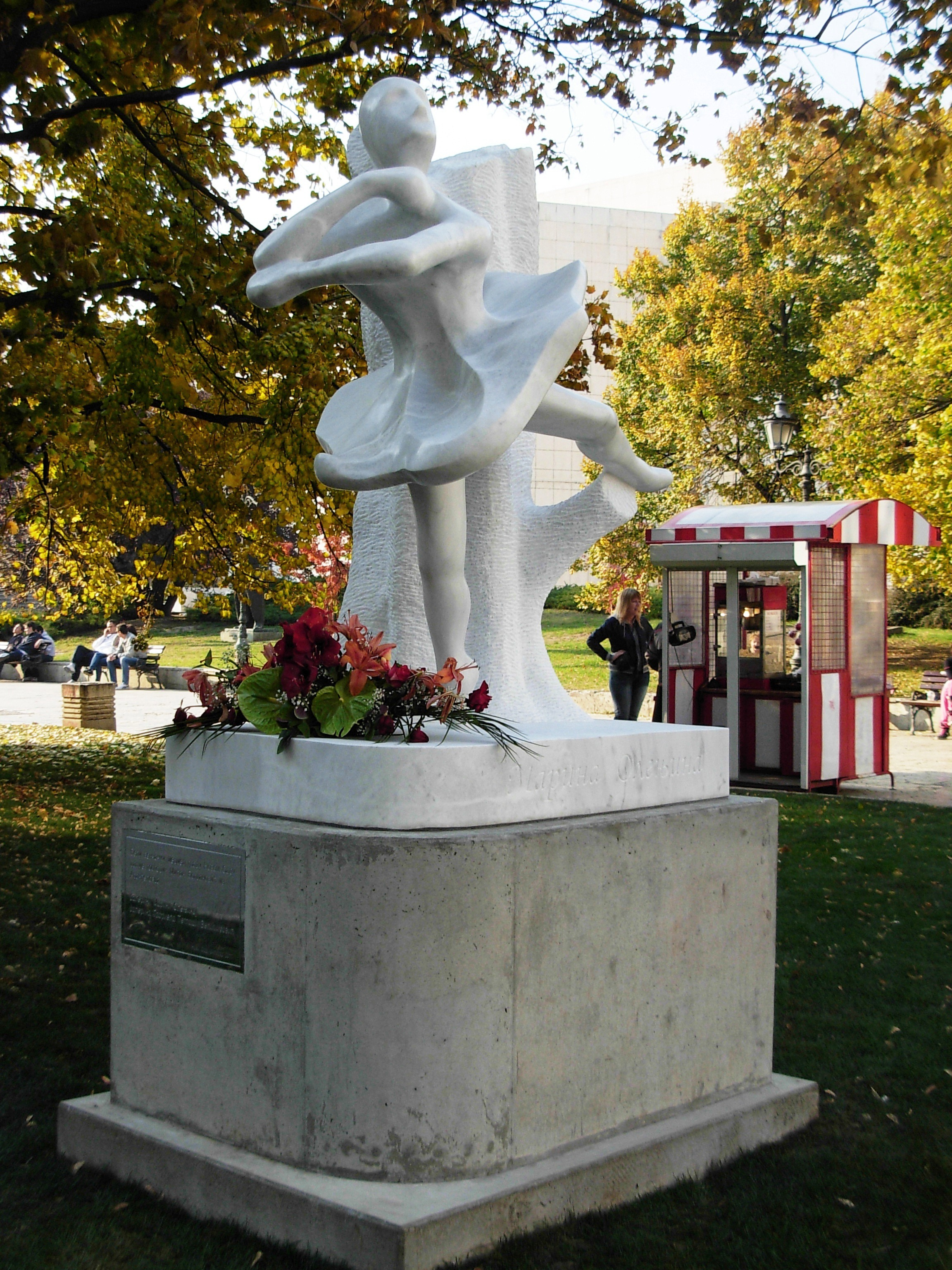 Spomenik Marini Olenjinoj ispred Srpskog narodnog pozorišta u Novom Sadu.